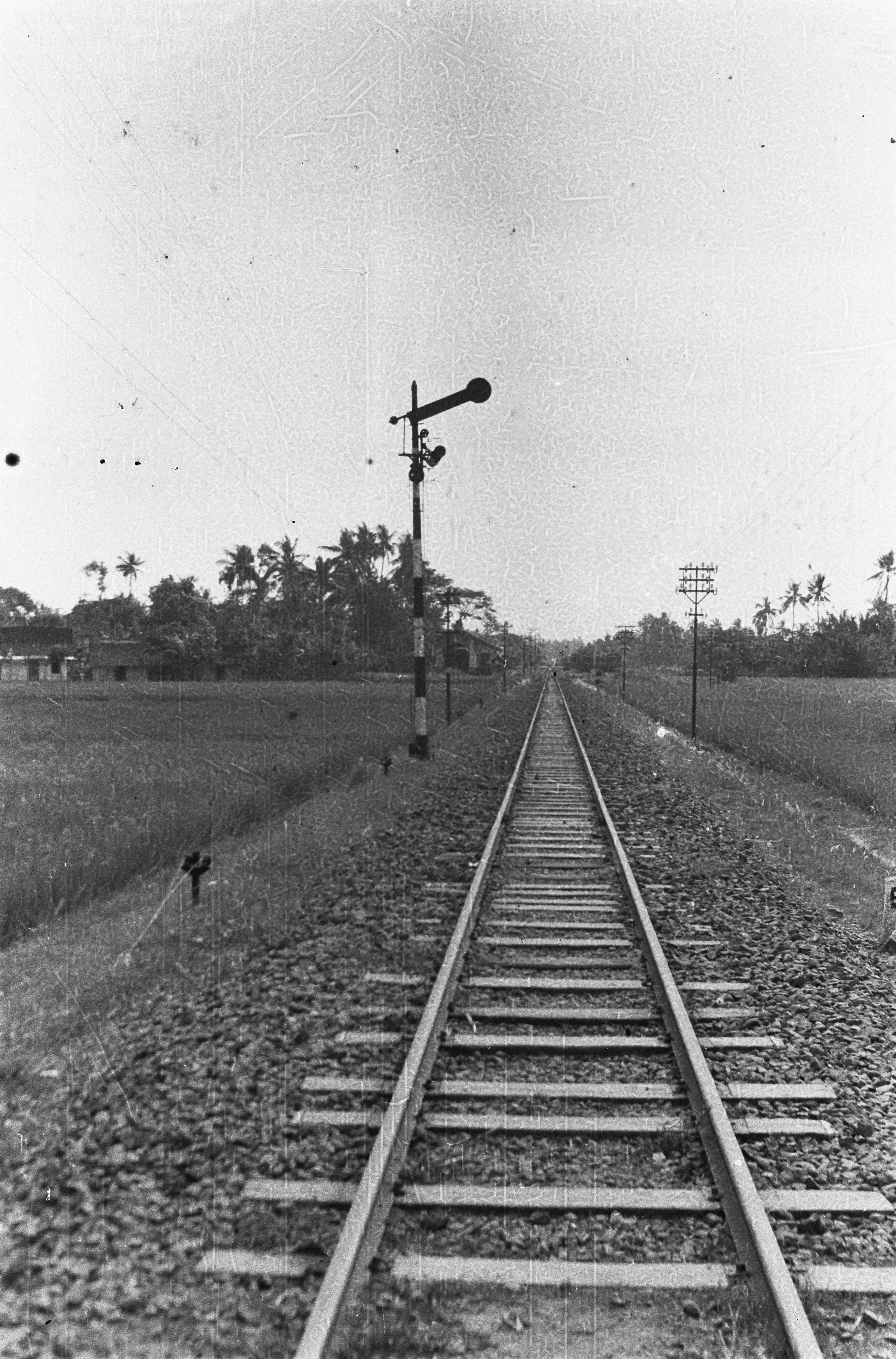 Collectie / Archief : Fotocollectie Dienst voor Legercontacten Indonesië Reportage / Serie : [DLC] Actie Weleri Beschrijving : Spoorlijn [bij Weleri] Datum : 1 augustus 1947 Locatie : Indonesië, Nederlands-Indië Fotograaf : Fotograaf Onbekend / DLC Auteursrechthebbende : Nationaal Archief Materiaalsoort : Negatief (zwart/wit) Nummer archiefinventaris : bekijk toegang 2.24.04.02 Bestanddeelnummer : 1759